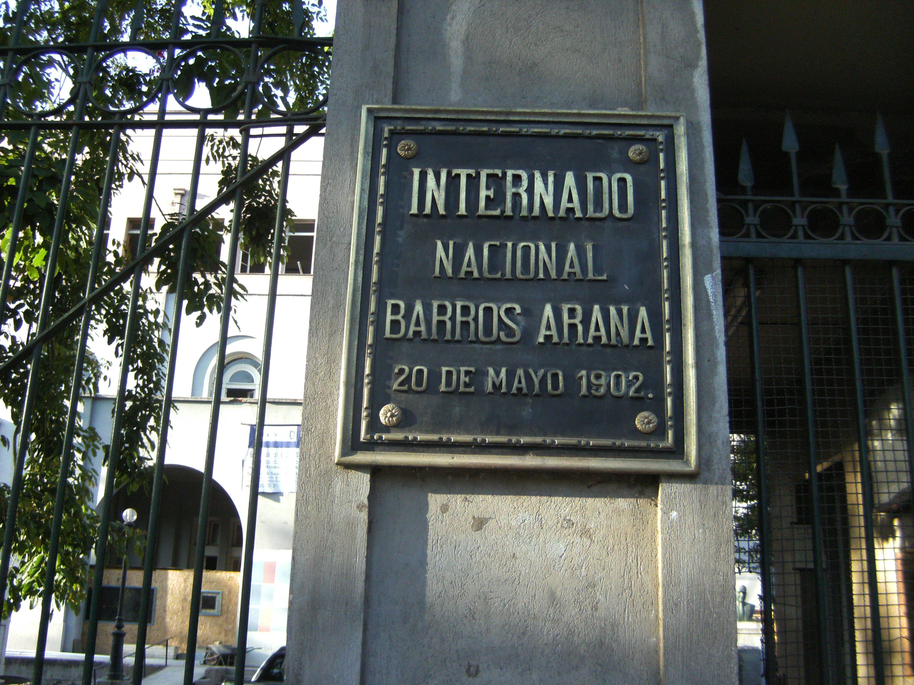 Placa en puerta del instituto Barros Arana